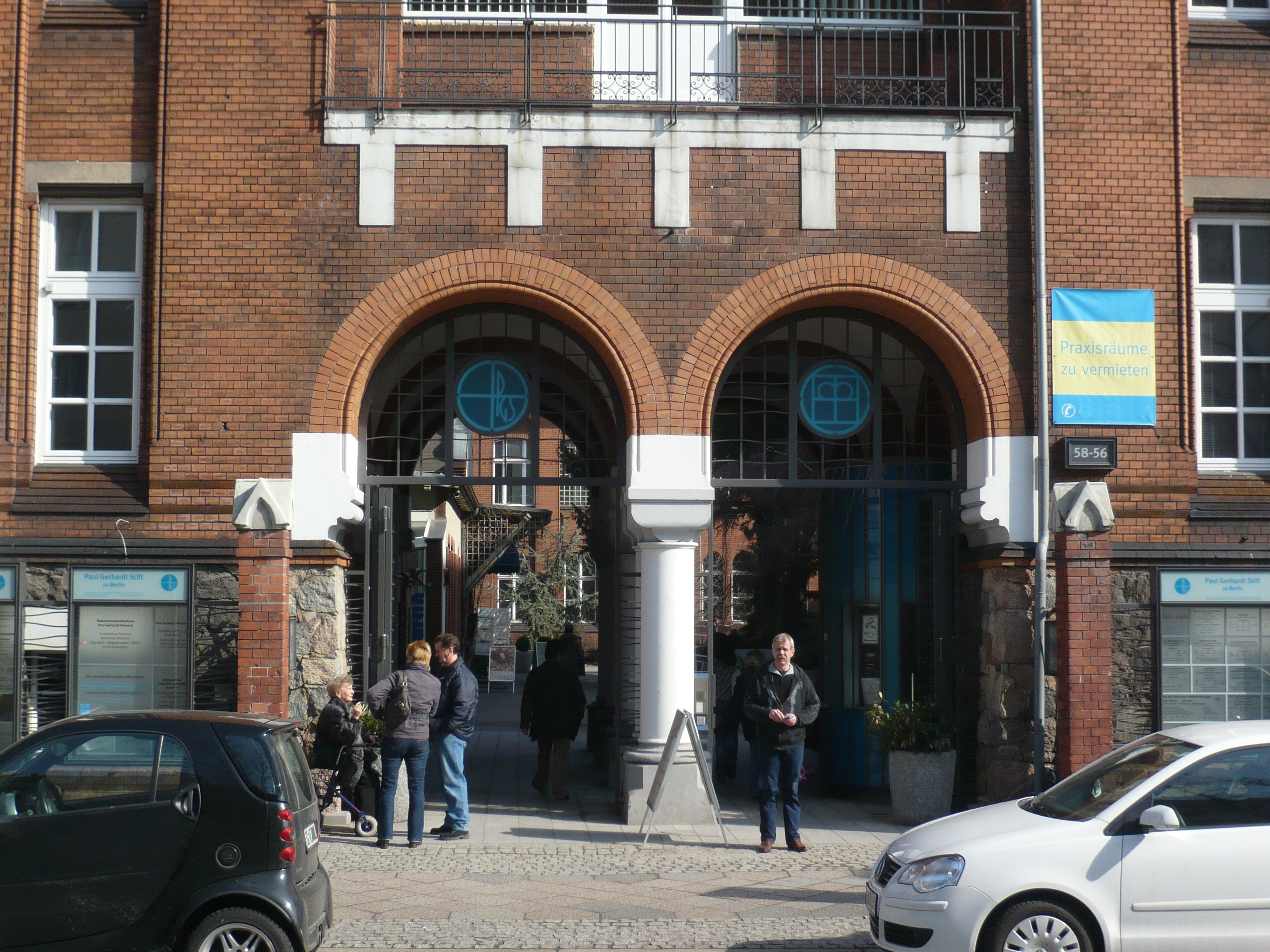 Paul-Gerhardt-Stift Berlin